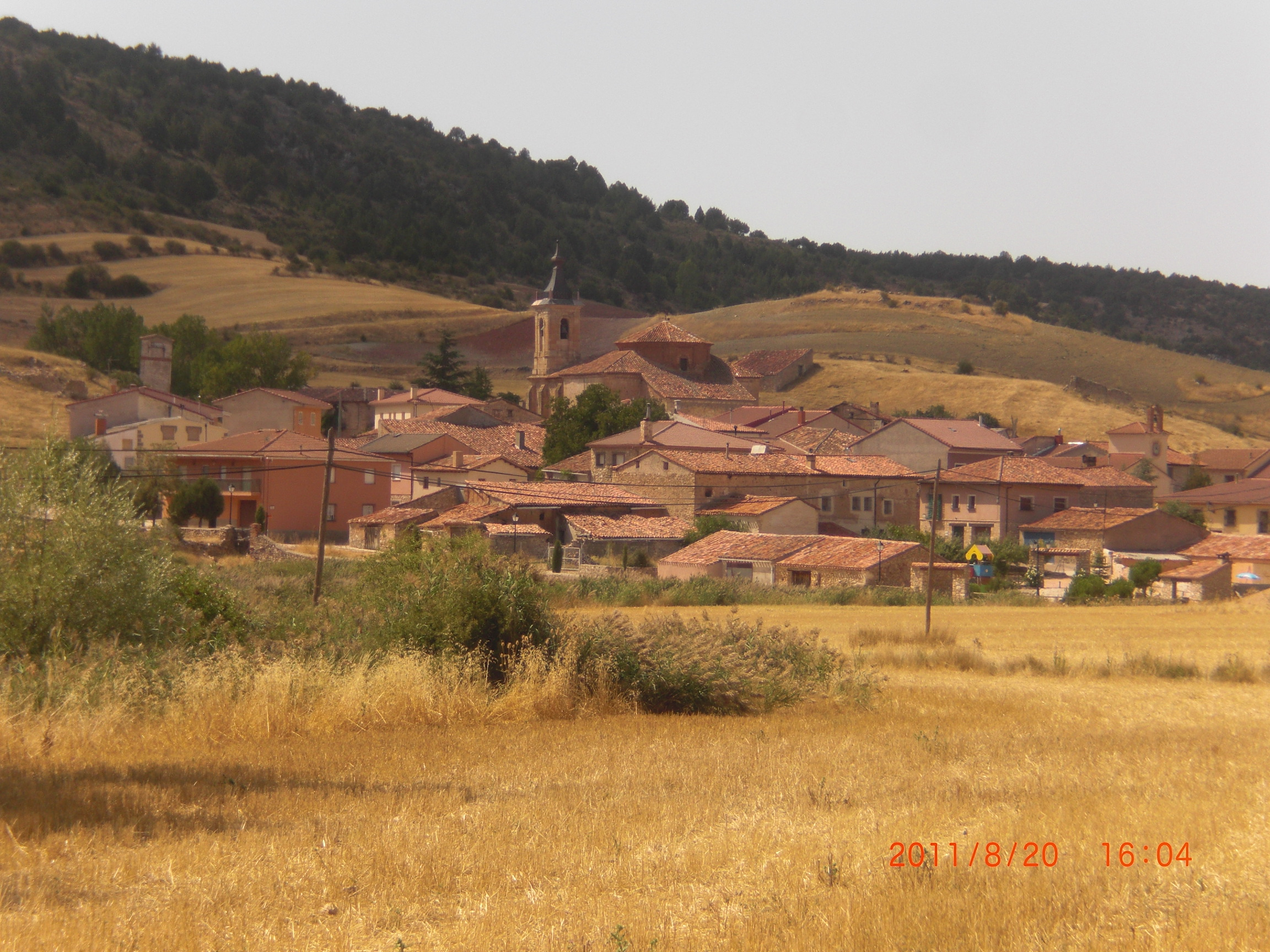 Vista general. Terzaga.